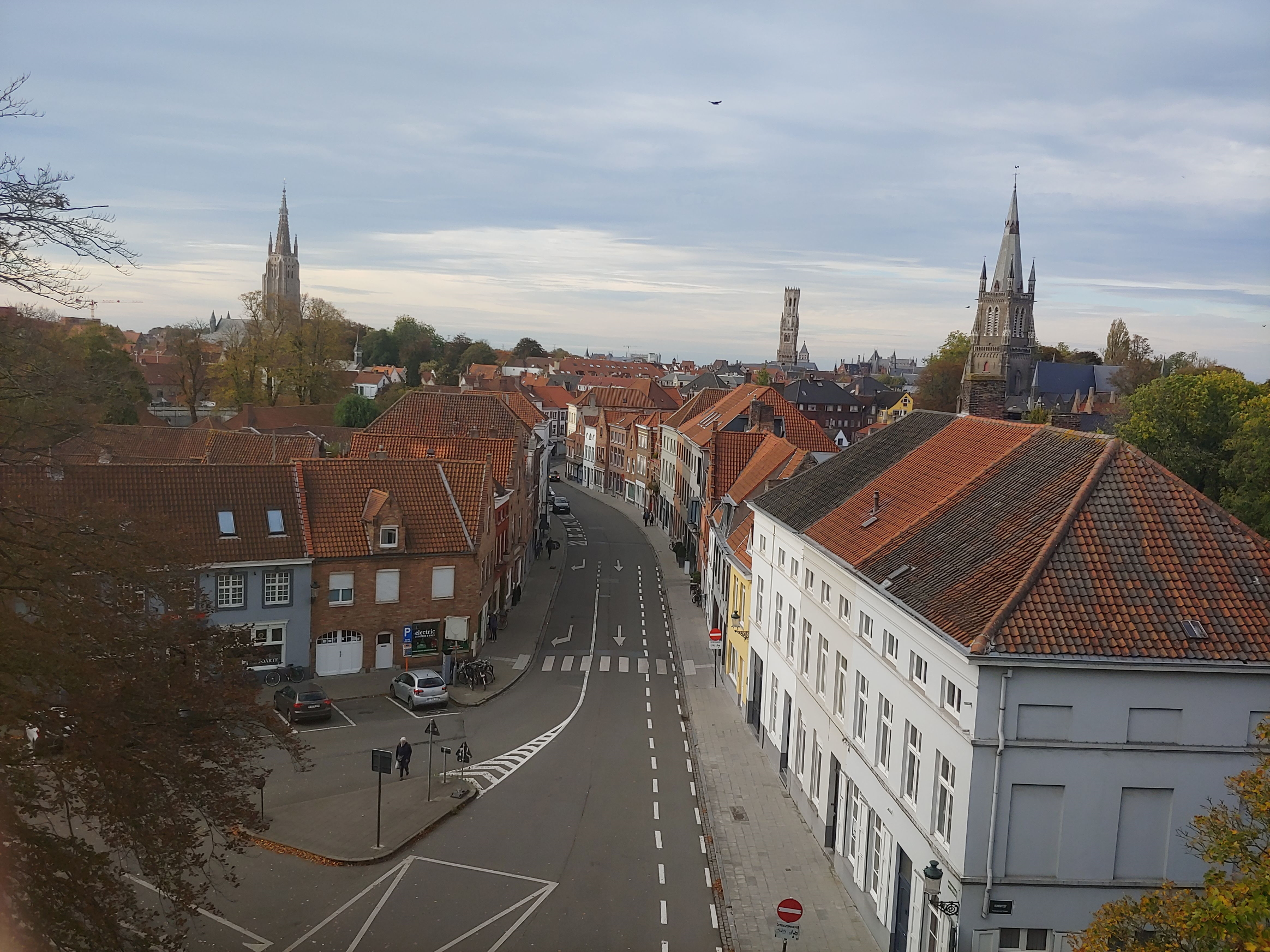 Gezicht op Brugge van op de Gentpoort. Onder meer te zien v.l.n.r.: Concertgebouw, Onze-Lieve-Vrouwekerk, AZ Sint-Jan, belfort, Sint-Jakobskerk, stadhuis, Magdalenakerk